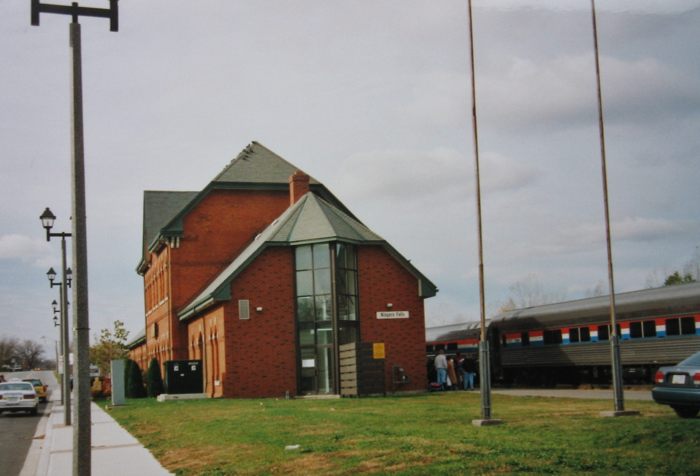 Niagara Falls station